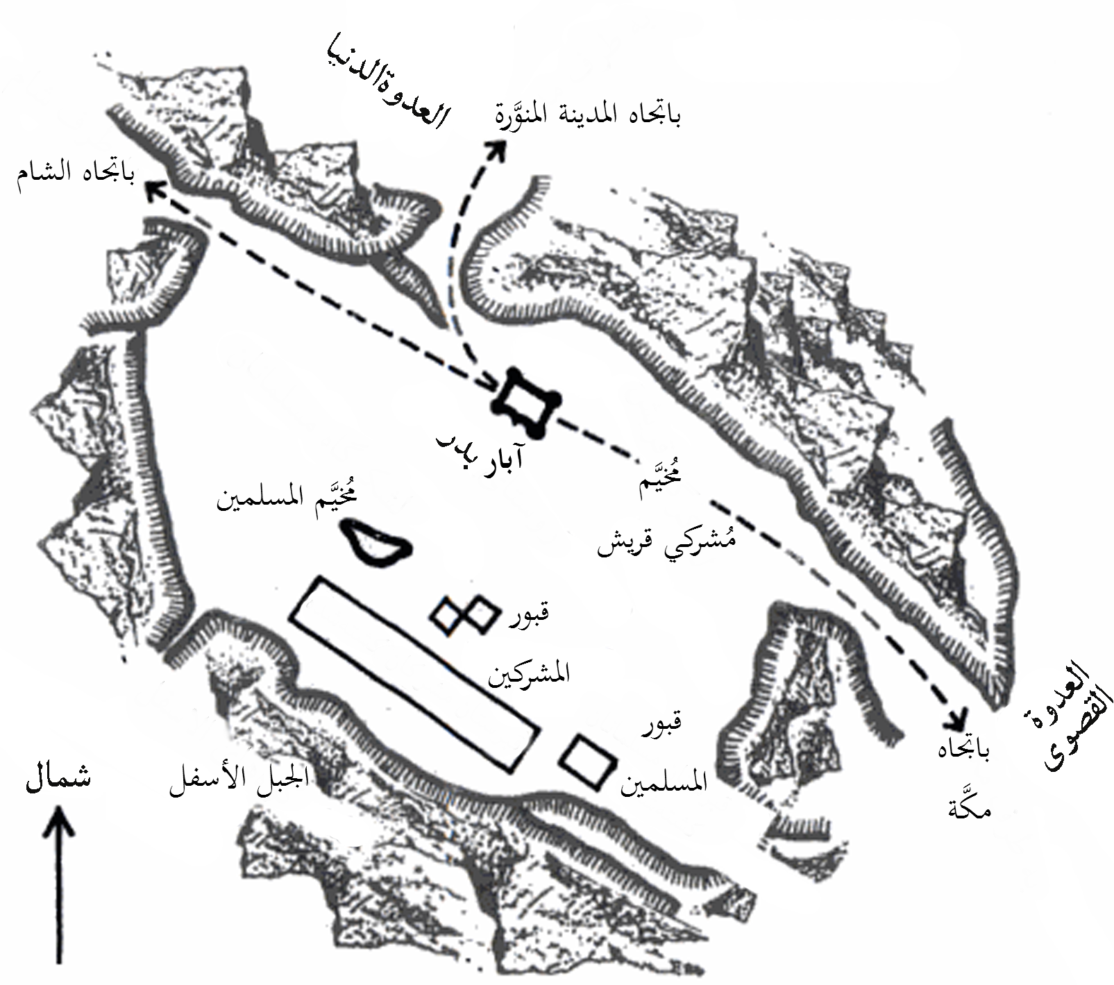 موقع معركة بدر: مُخيَّم المُسلمين والمُشركين وقبور القتلى من كِلا الفريقين